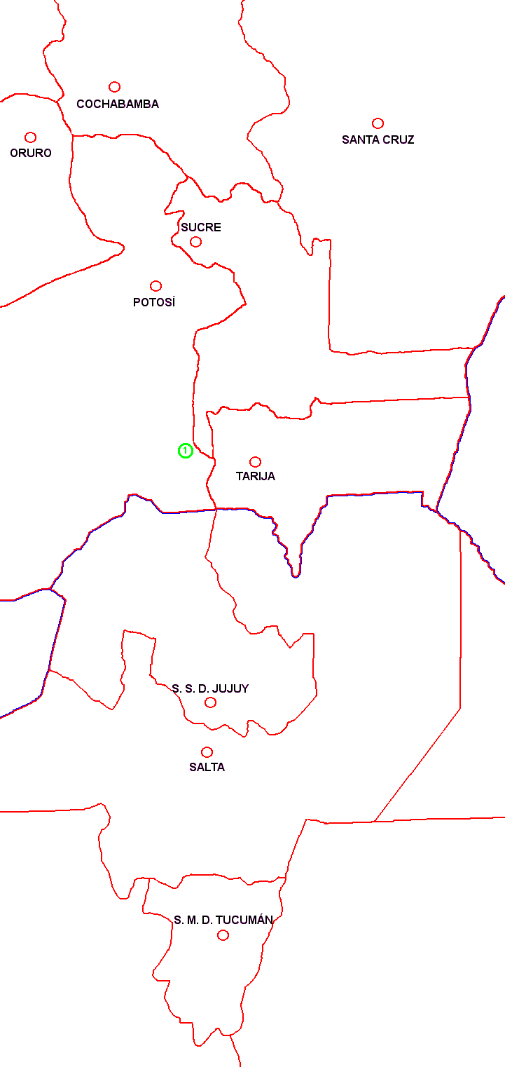 Rebutia torquata - range map